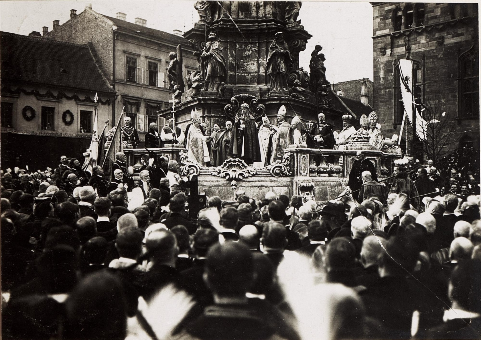 Krönung Kaiser Karls in Budapest